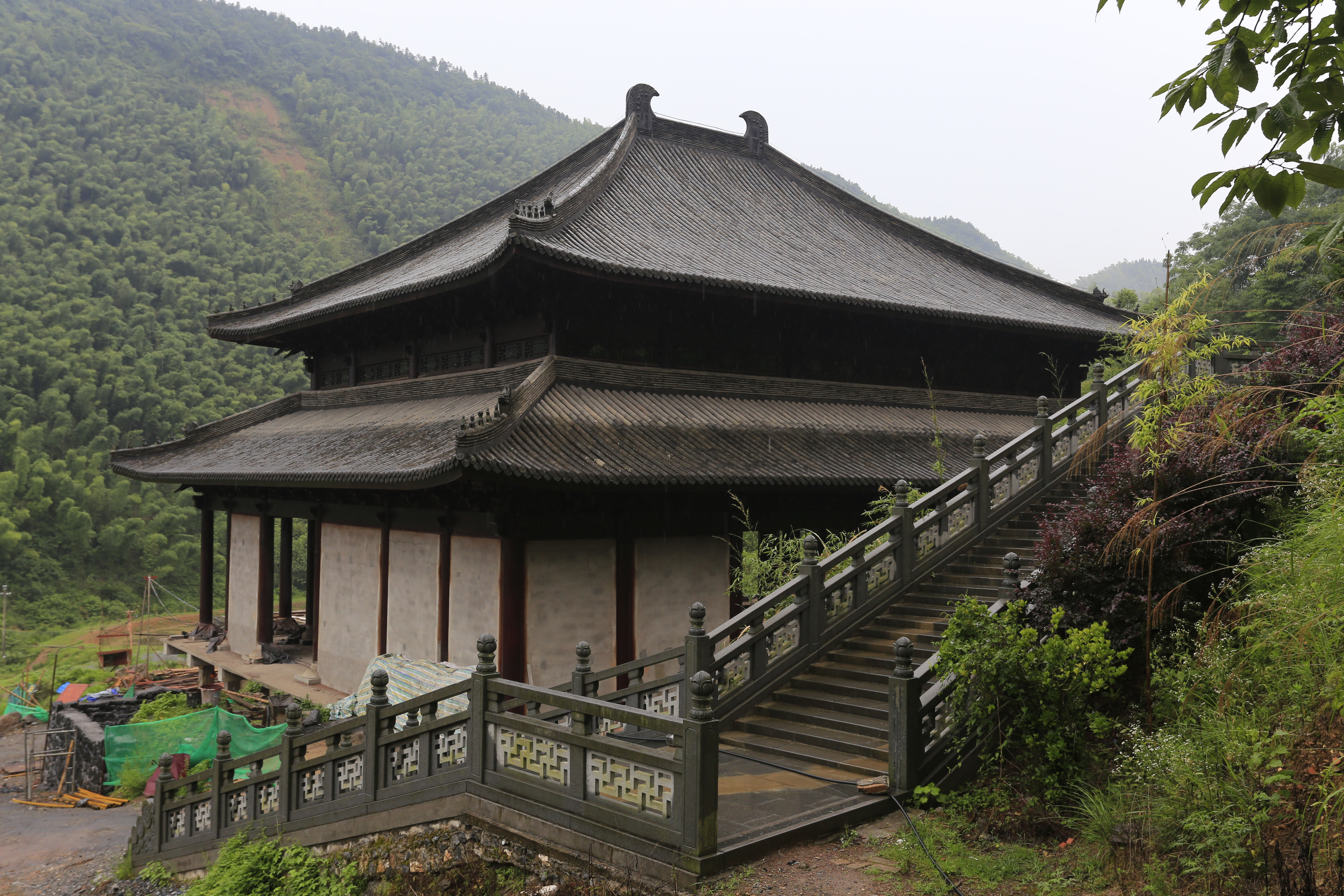 萍乡杨岐山 普通寺新建的大殿